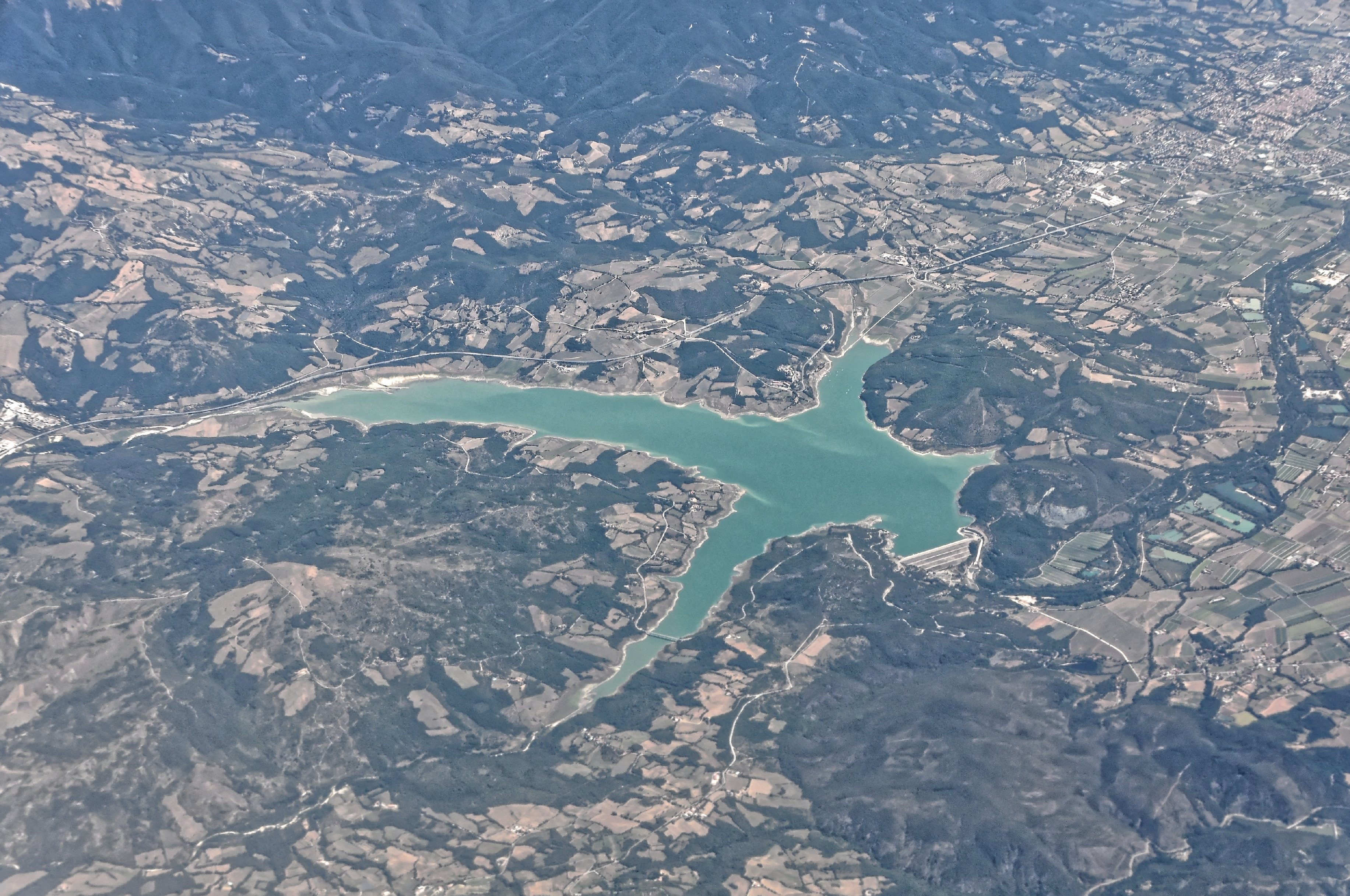 Bilder vom Flug -Rom-Düsseldorf-Hamburg 2013 Dieses Foto entstand in Zusammenarbeit mit Stadtbesichtigungen.de Die Seiten Stadtbesichtigungen.de, der dazugehörige Reise Blog sowie die Facebookseite: Stadtbesichtigungen Rom dürfen dieses Bild für Ihre Veröffentlichungen ohne den Hinweis auf Wikipedia, Commons bzw der Lizenz verwenden. Die Verantwortlichen habe von mir (Ra Boe) die Originaldaten zur freien Verfügung übermittelt bekommen.